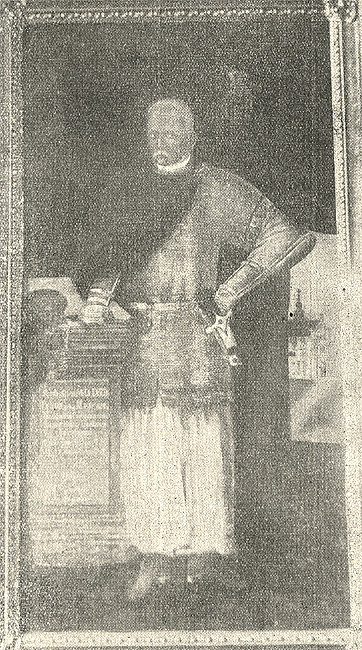 Paul Majkowski